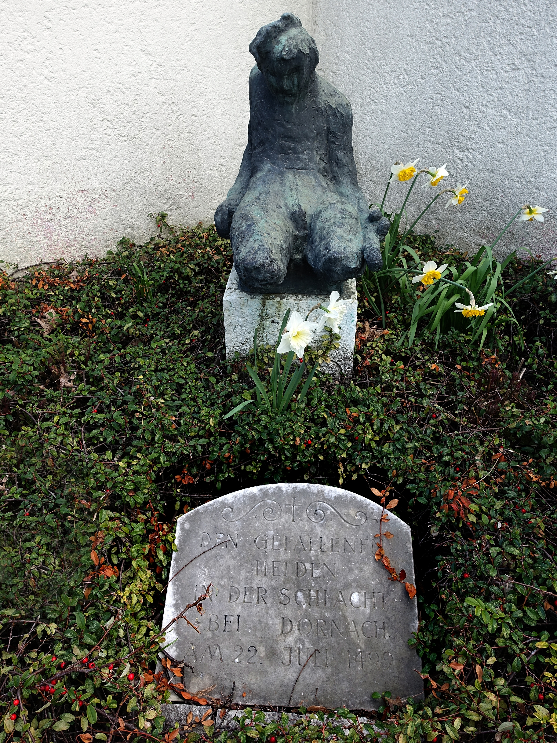 Jakob Probst (1880–1966) Bildhauer. 1949, Sterbender Krieger. Ein sitzender sterbender oder schon toter Mensch mit abgehacktem Unterschenkel. Kriegerdenkmal für die Schlacht bei Dornach, in der Umfriedung der alten Mauritiuskirche in Dornach